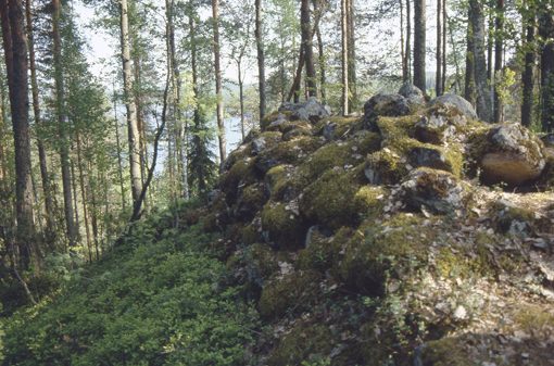 Sulkavan Linnavuoren vallikiveystä